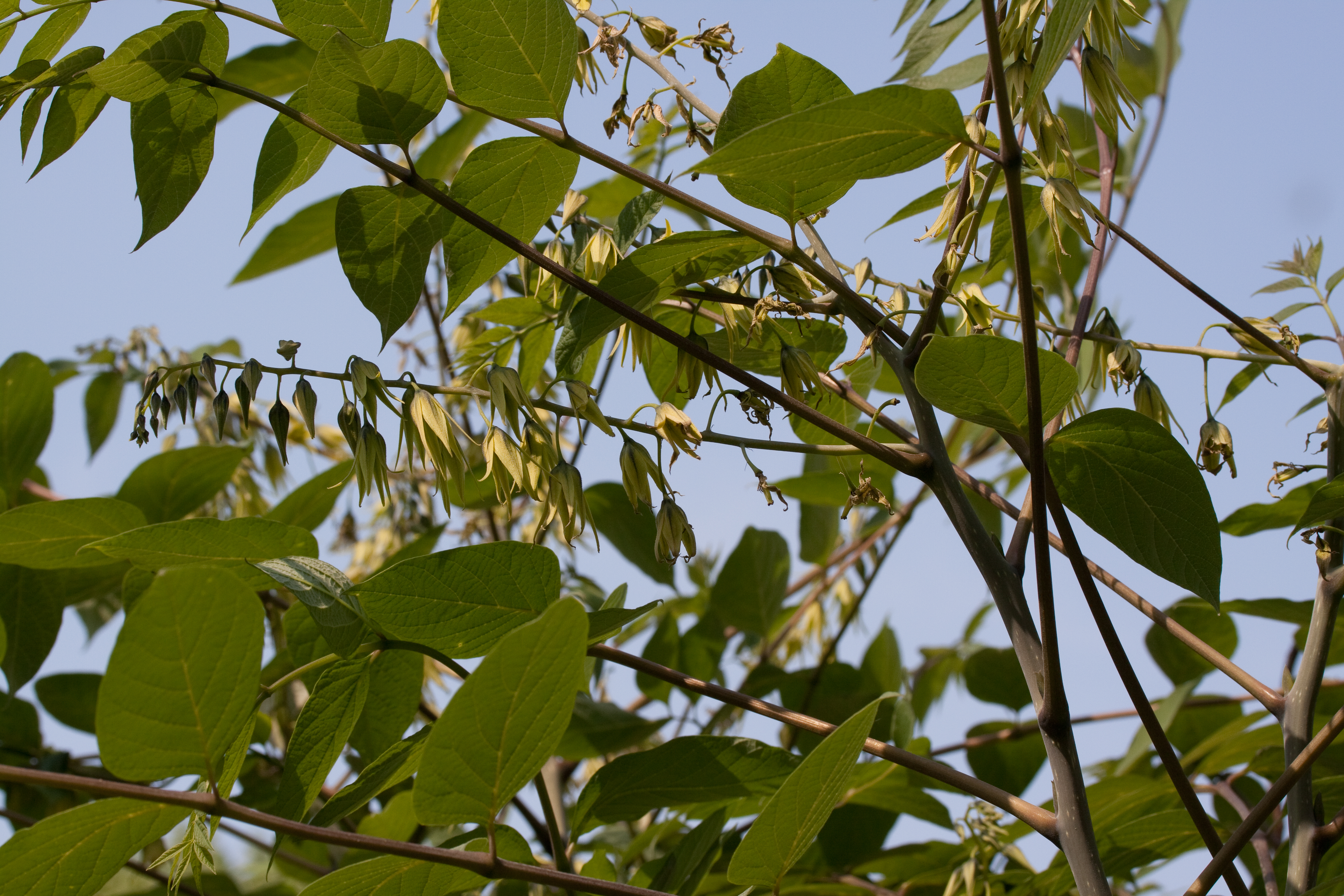 Floraison de Decaisnea fargesii au Jardin des Plantes - Paris - France